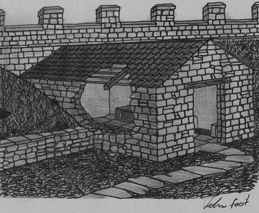 Latrine des Kastell Arbeia (frühes 3. Jahrhundert)